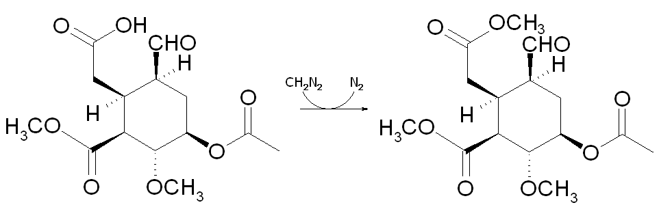 Zehnter Schritt der Reserpin-Totalsynthese nach Woodward: Fertigstellung des E-Rings durch Methylierung.